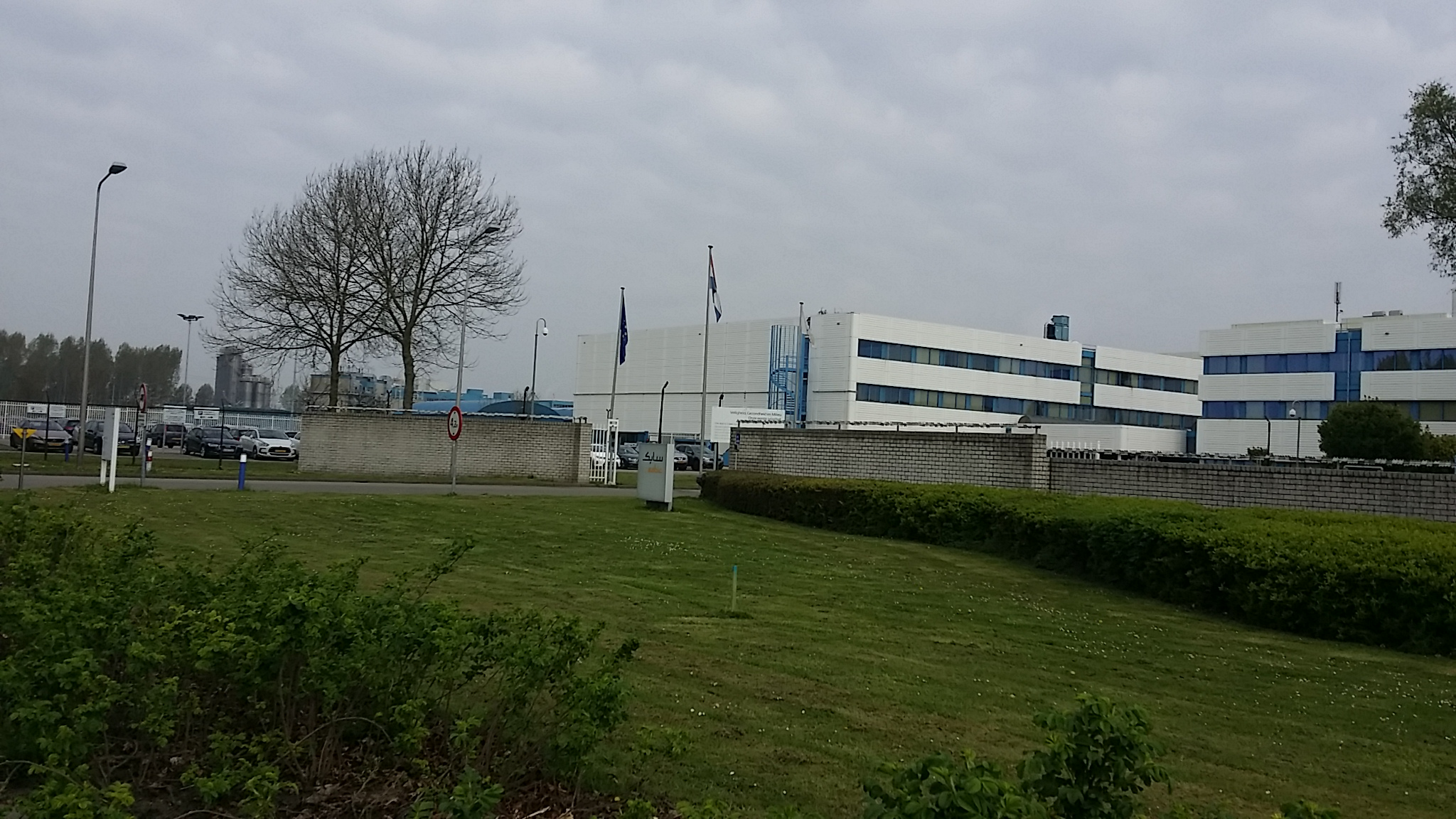 Bergen op Zoom, the Netherlands